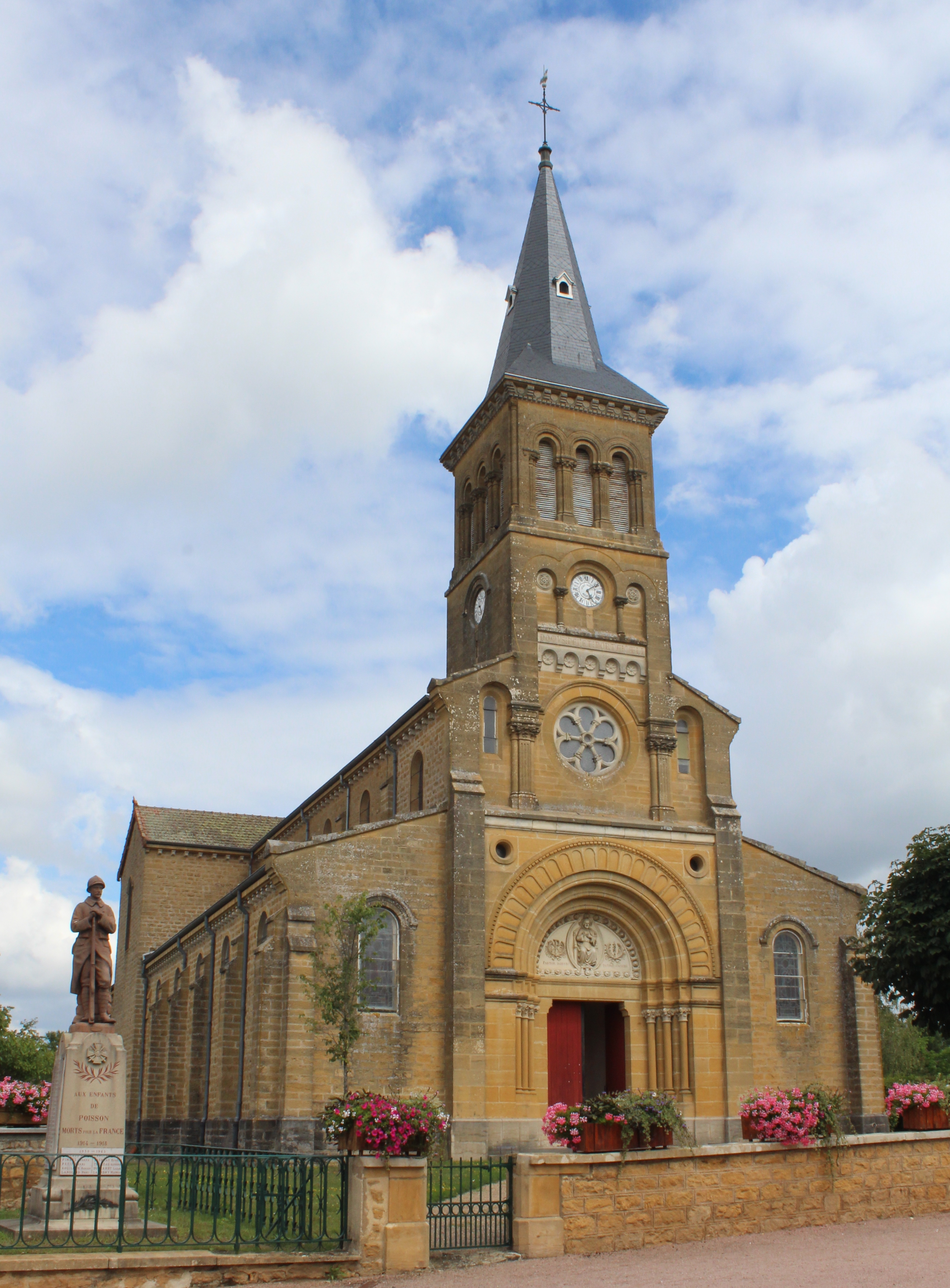 Église Saint-Jean-Baptiste de Poisson, Saône-et-Loire.